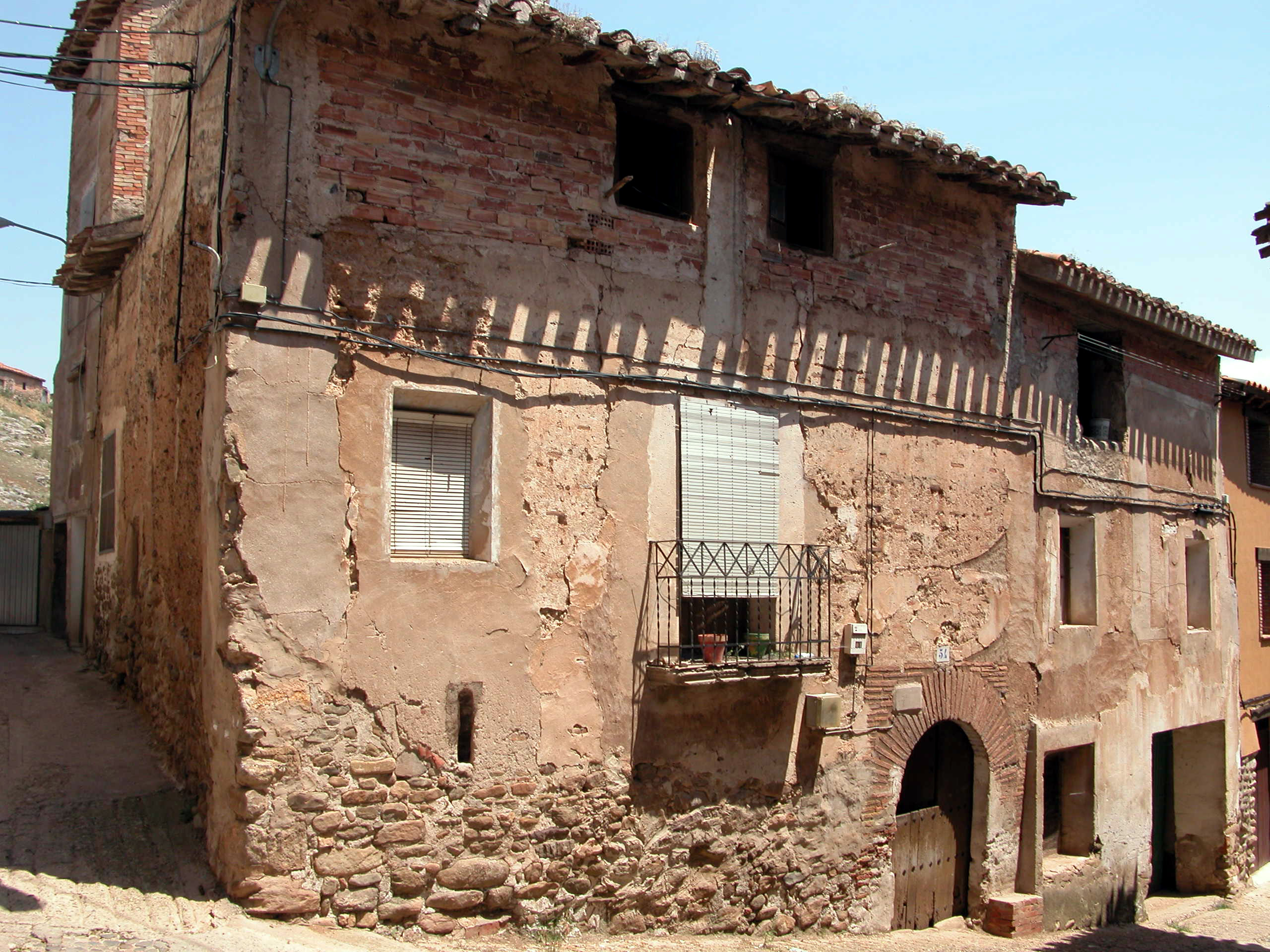 Santa Engracia del Jubera en La Rioja (España).